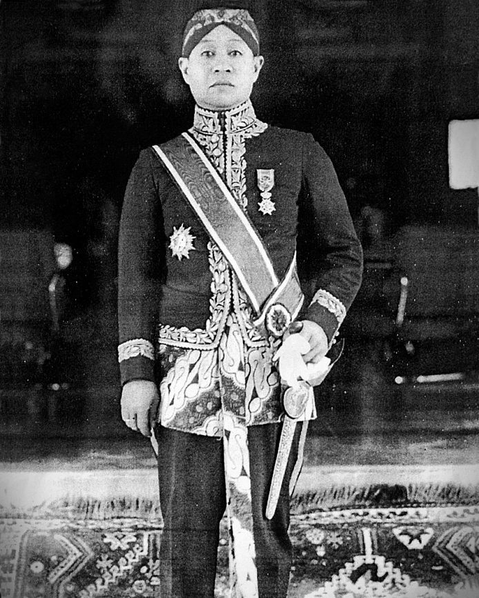 Bupati R.H.A.A. WIRANATA KUSUMAH V (Dalem Haji) Periode 1920-1931, 1935-1945